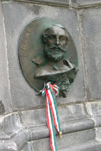 Lázár Vilmost ábrázoló dombormű az aradi Szabadság-szobor talapzatán